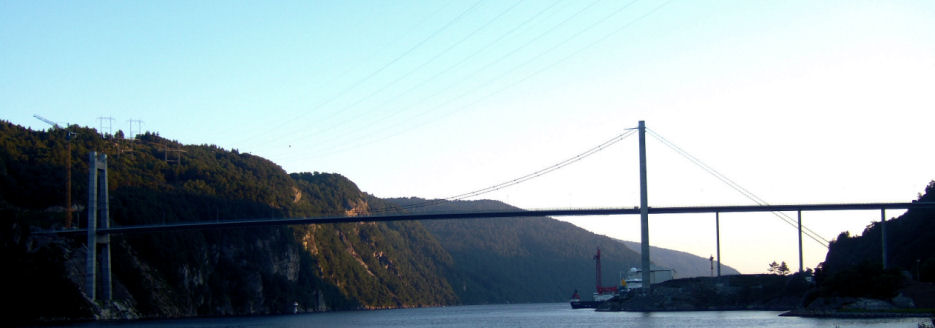 Fedafjorden bru - Bildet er tatt to uker før broen åpnet offisielt. Bildet er tatt av meg Jarvin den 28.07.2006